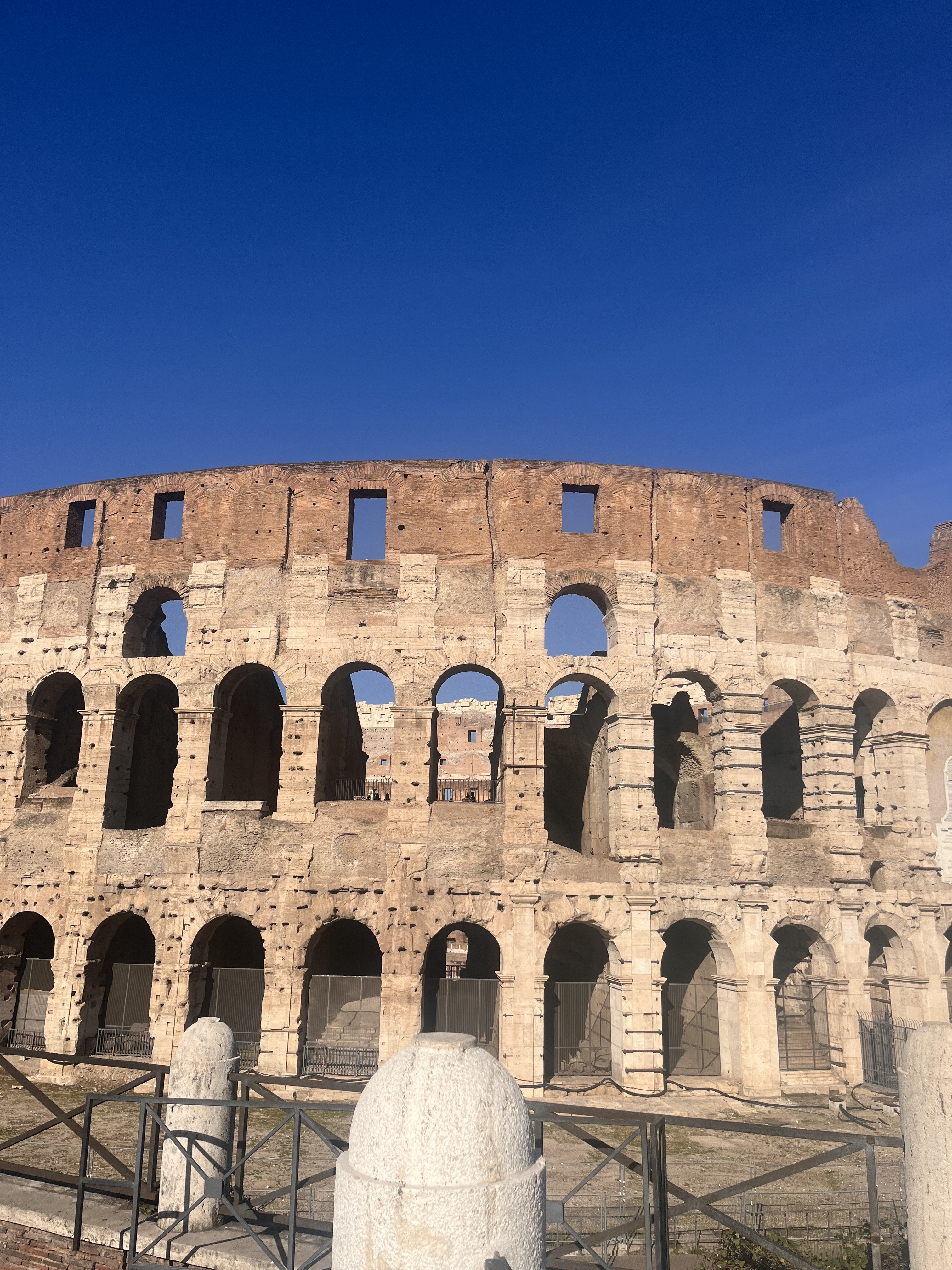 el coliseo romano 80 d. C.